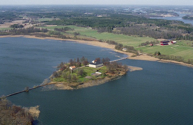 Vibyholms slott på slottsholmen